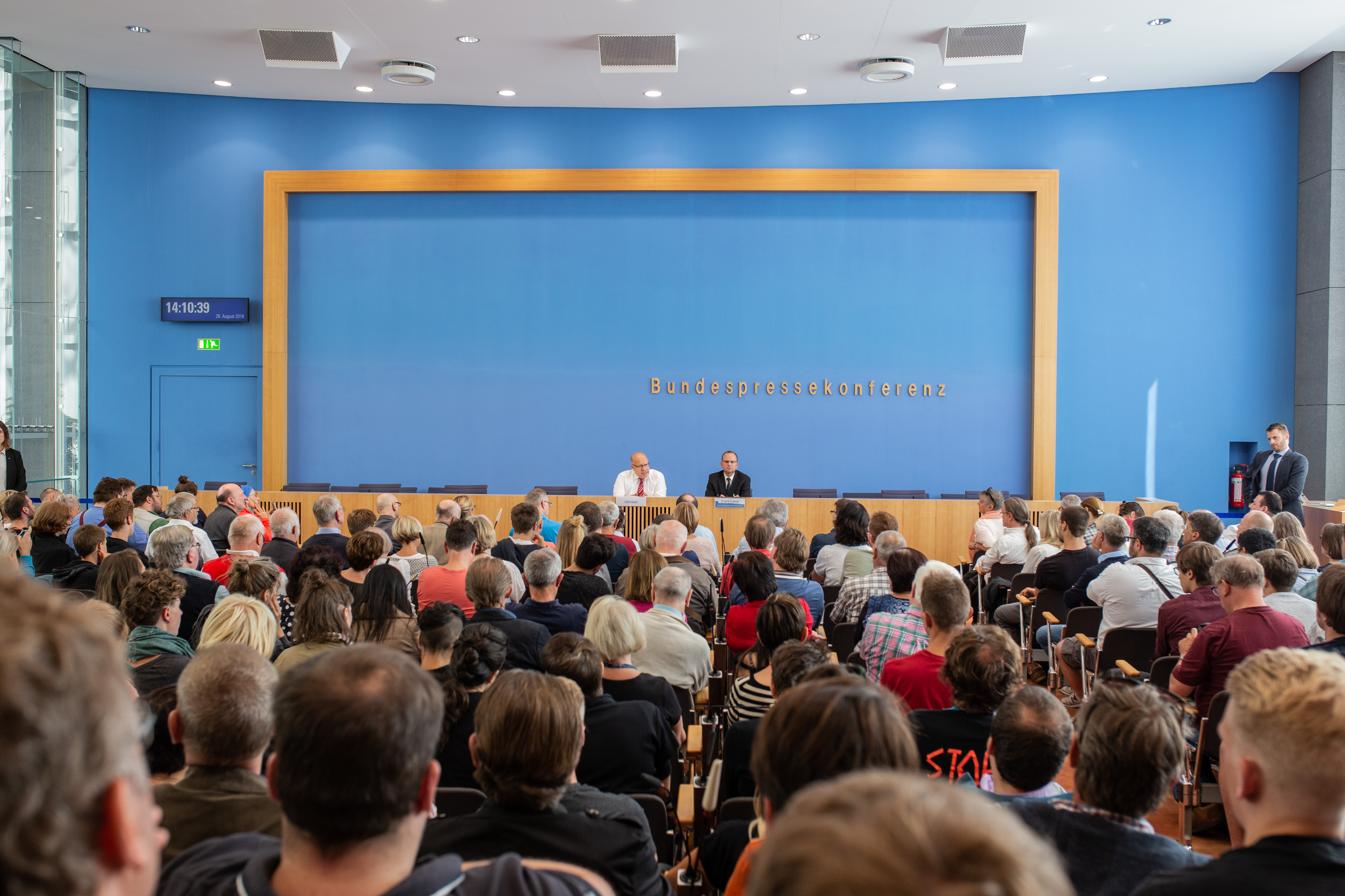 Bundespressekonferenz mit Peter Altmaier zum Tag der offenen Tür der Bundesregierung am 26. August 2018.